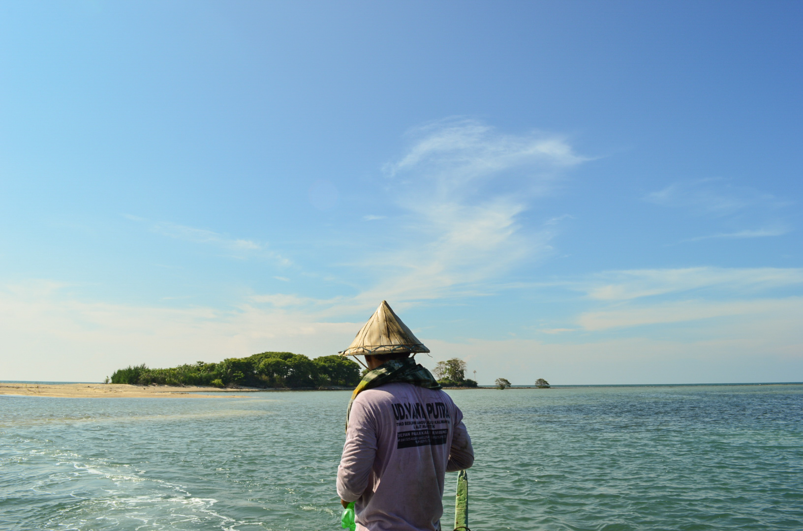 Seorang nelayan yang merangkap bekerja sebagai pemandu untuk menyebrang pulau di Pulau Gedhe. Sebagian besar nelayan yang tinggal berdekatan dengan tepi pantai kota Rembang juga menerima jasa antar menyebrang pulau-pulau di kota Rembang.